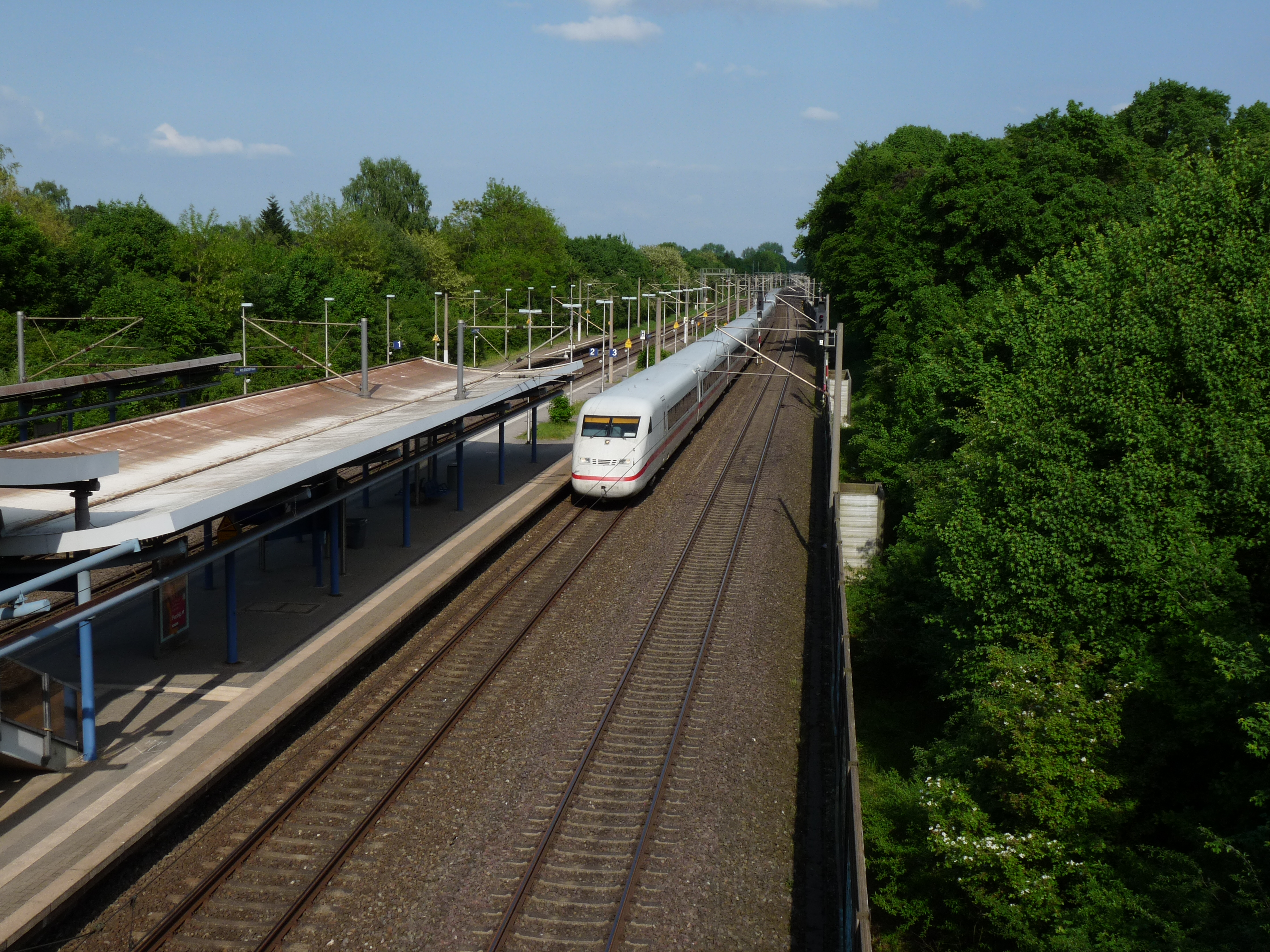 Een ICE passeert het station Hannover-Karl-Wiechert-Allee